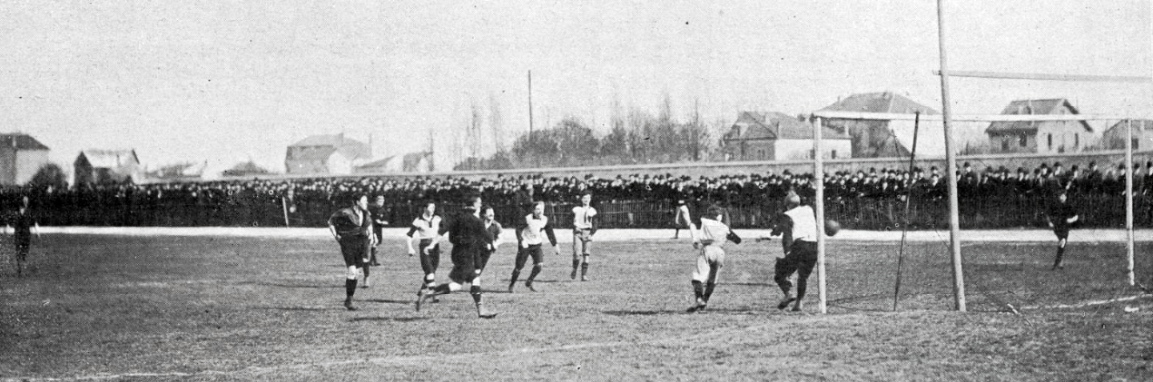 Match de barrage du championnat de Paris 1899 le 16 avril entre le Club français et le Standard AC.